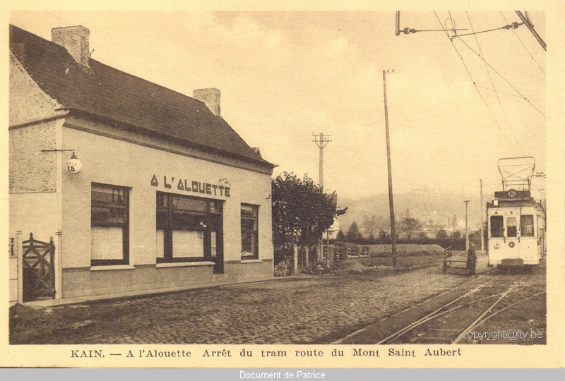 Motrice électrique (probablement la 9925 ou une similaire) sur la ligne K au terminus de la station de Kain l'Alouette.